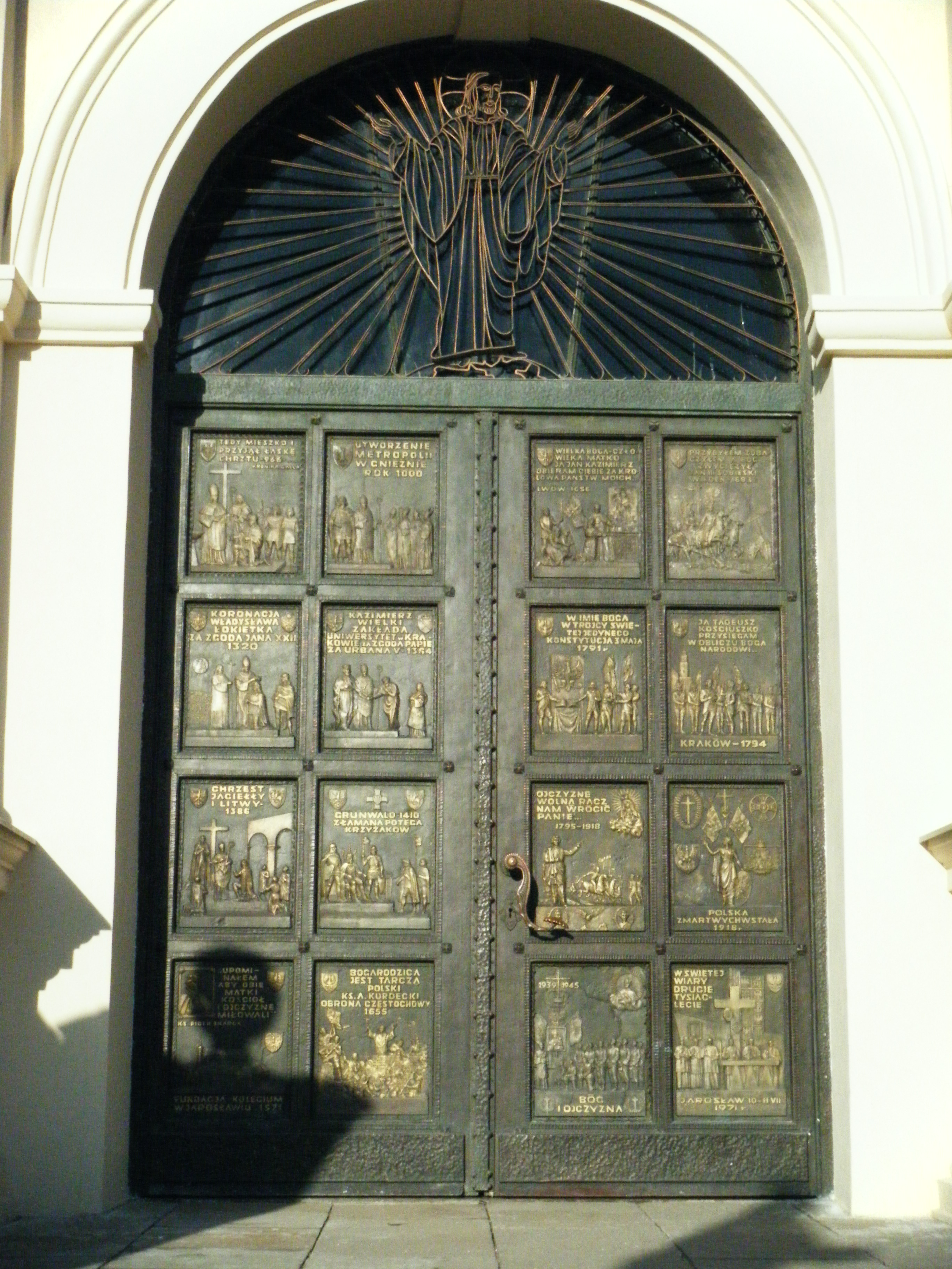 Główne wejscie - drzwi. Kolegiata Bożego Ciała - Jarosław